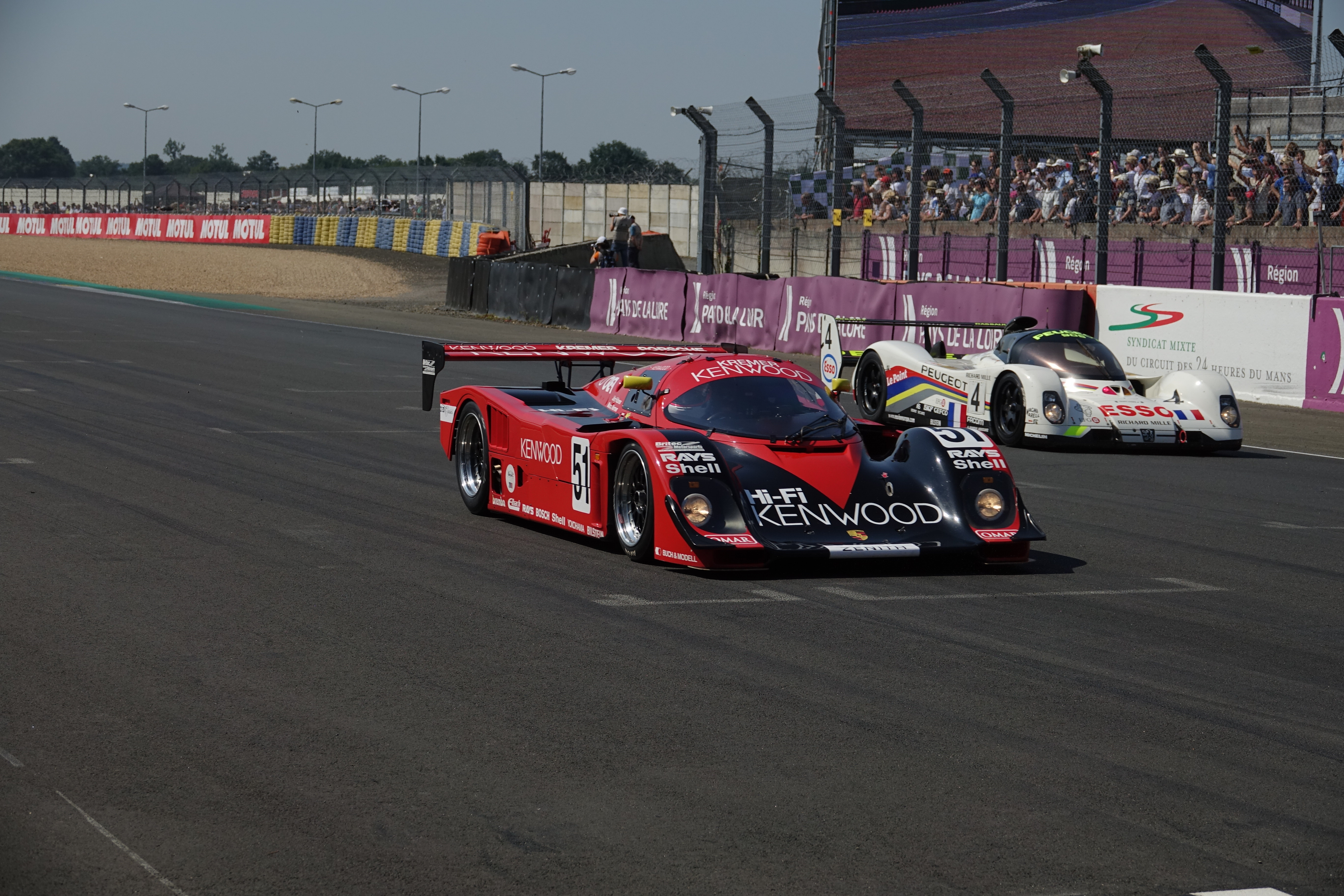 Le Mans Classic 2018